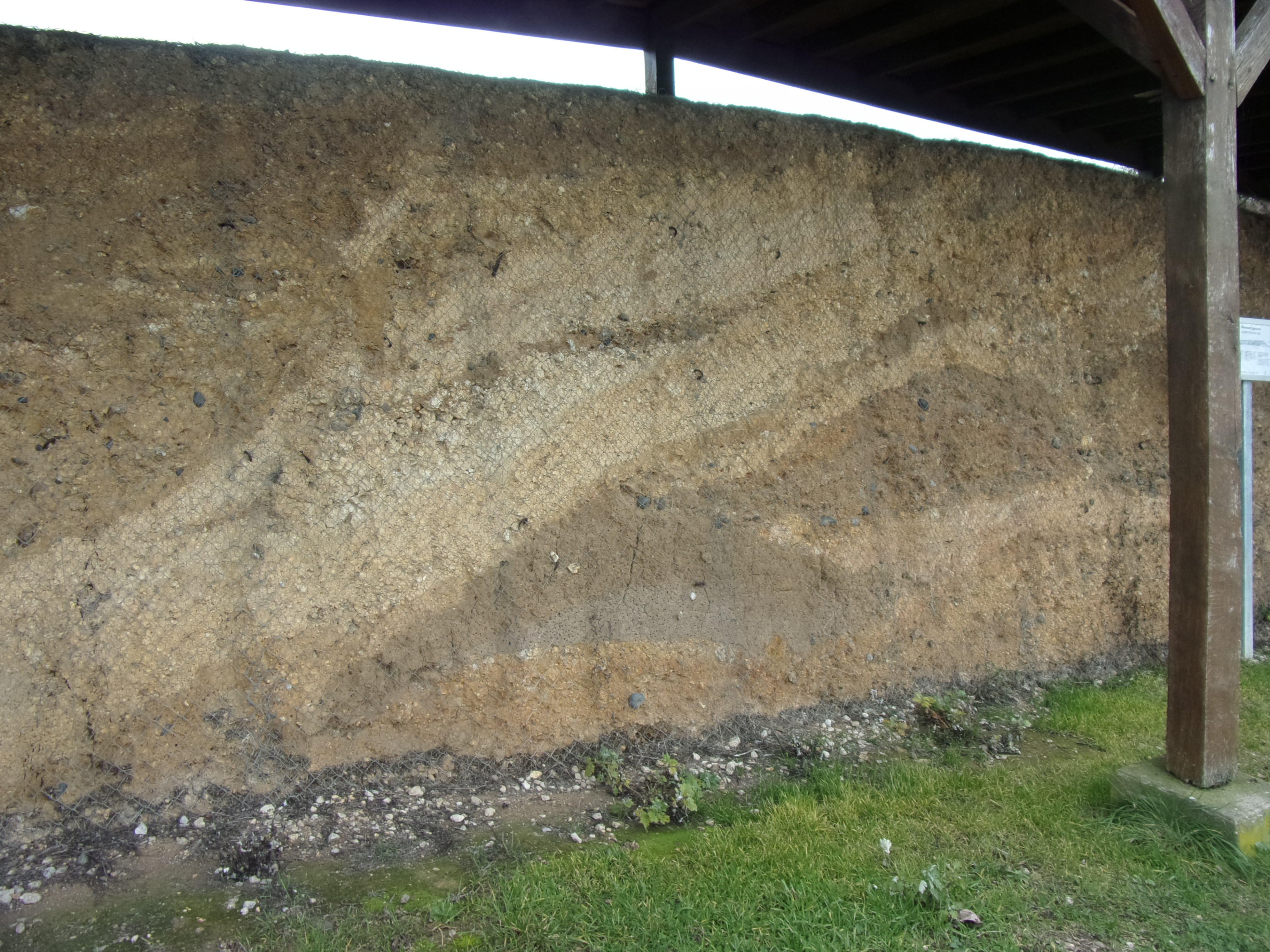 Coupe du rempart de l'oppidum des Châteliers montrant les stratifications successives